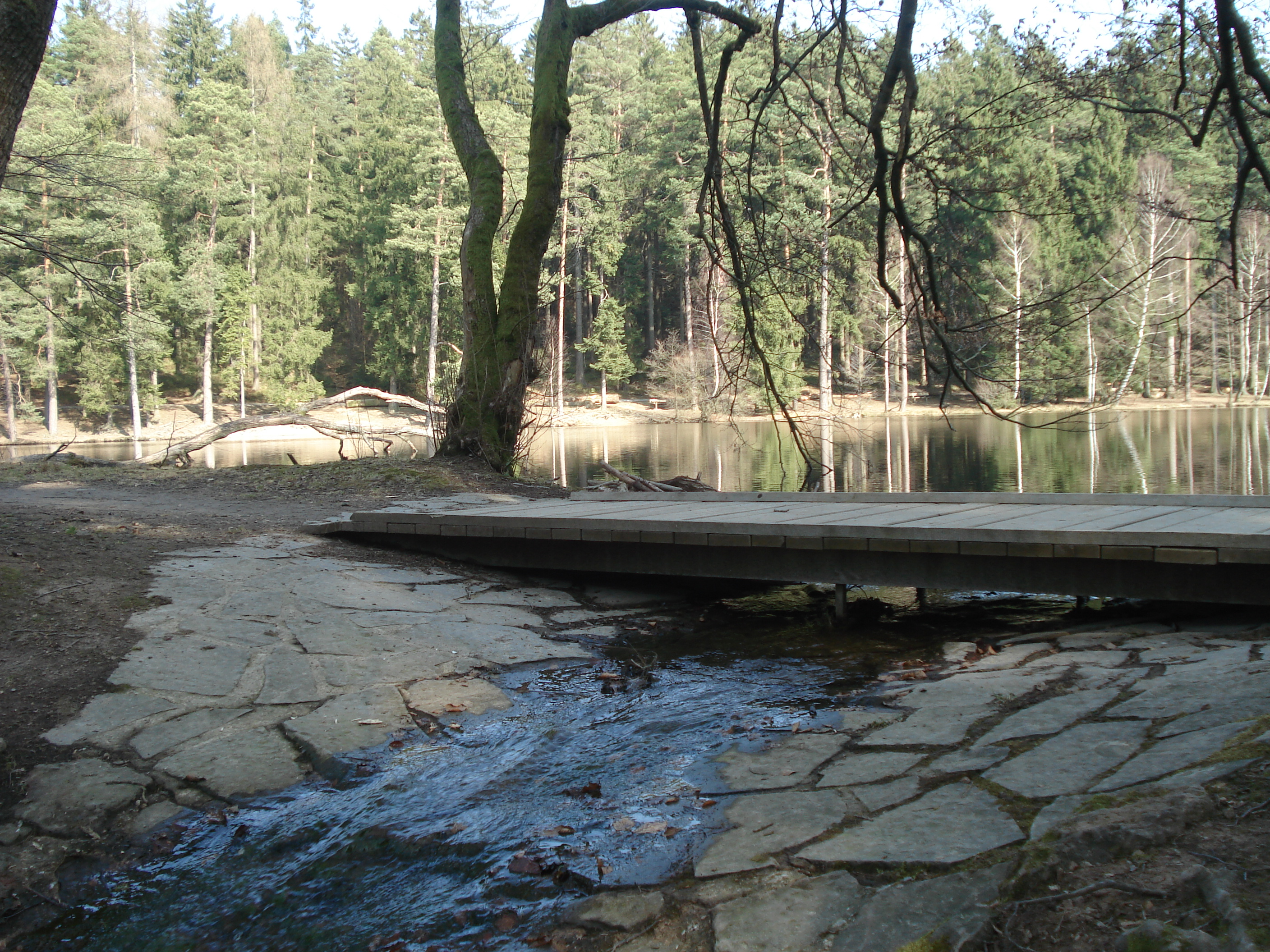 Der Wiesbüttgraben entfließt dem Wiesbüttsee